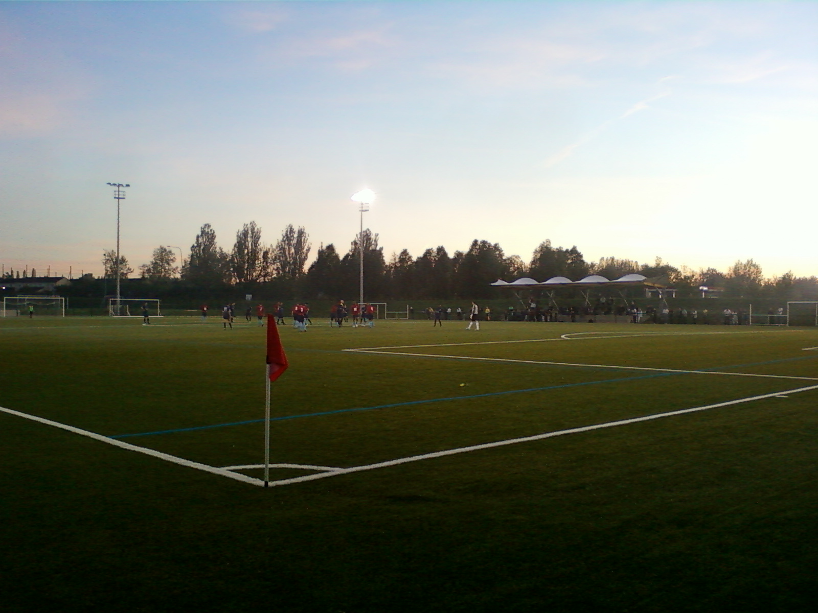 Le stade Salif-Keita de Cergy lors du 1/4 de finale de Coupe de Paris entre Cergy-Pontoise FC et Paris FC B